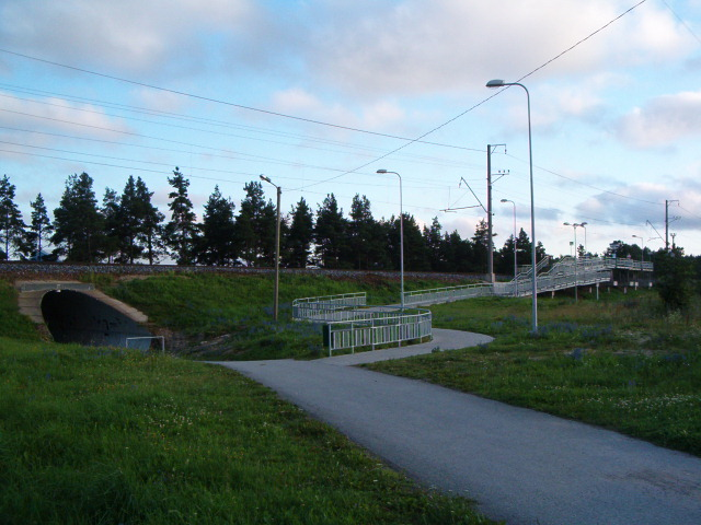 Urda raudteepeatus